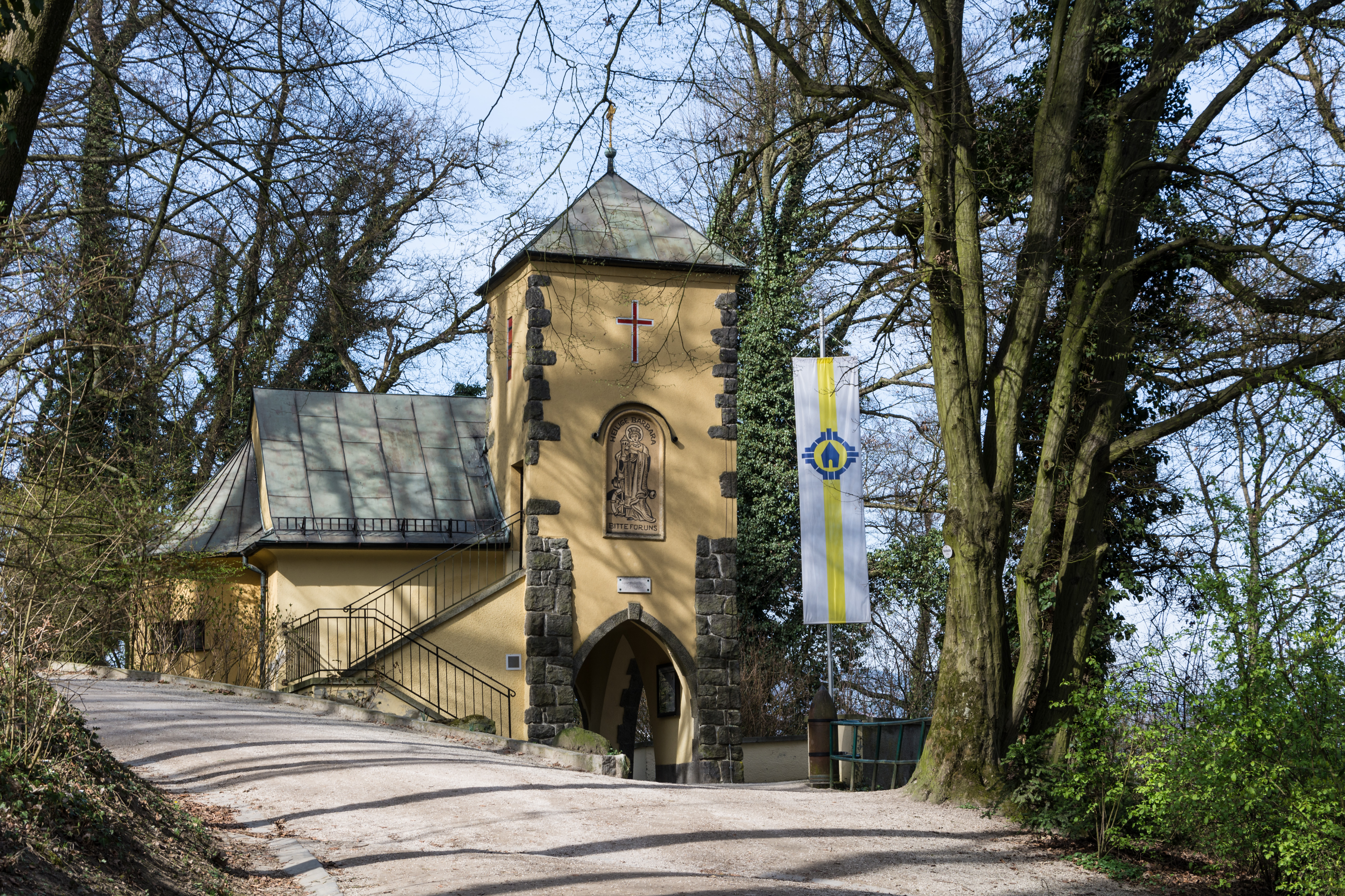 Die Barbarakapelle wurde 1932 vom oberösterreichischen Artilleristenbund als Kriegerdenkmal erbaut (KG Linz, GStNr. 2802/2).